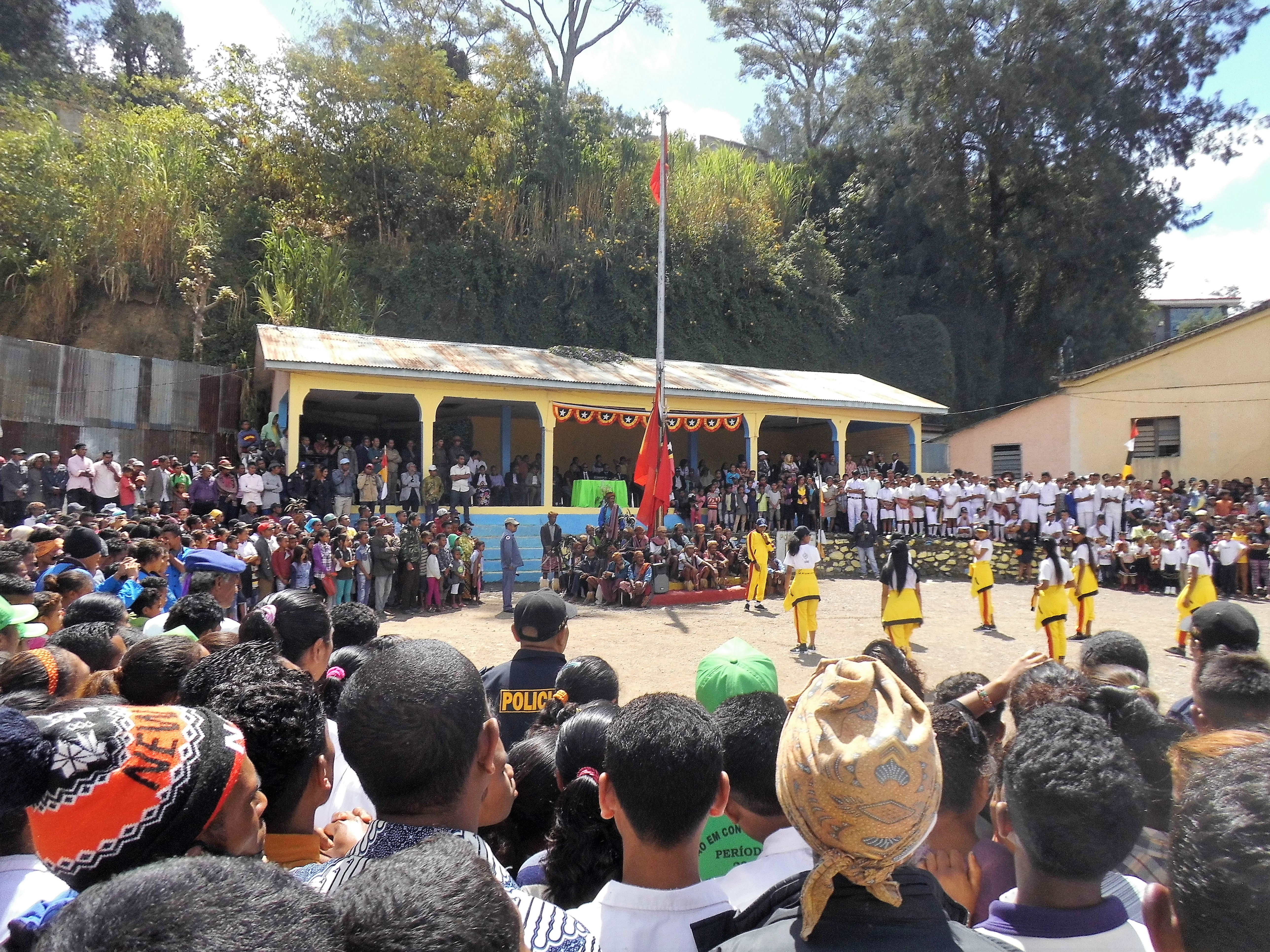 Maubisse